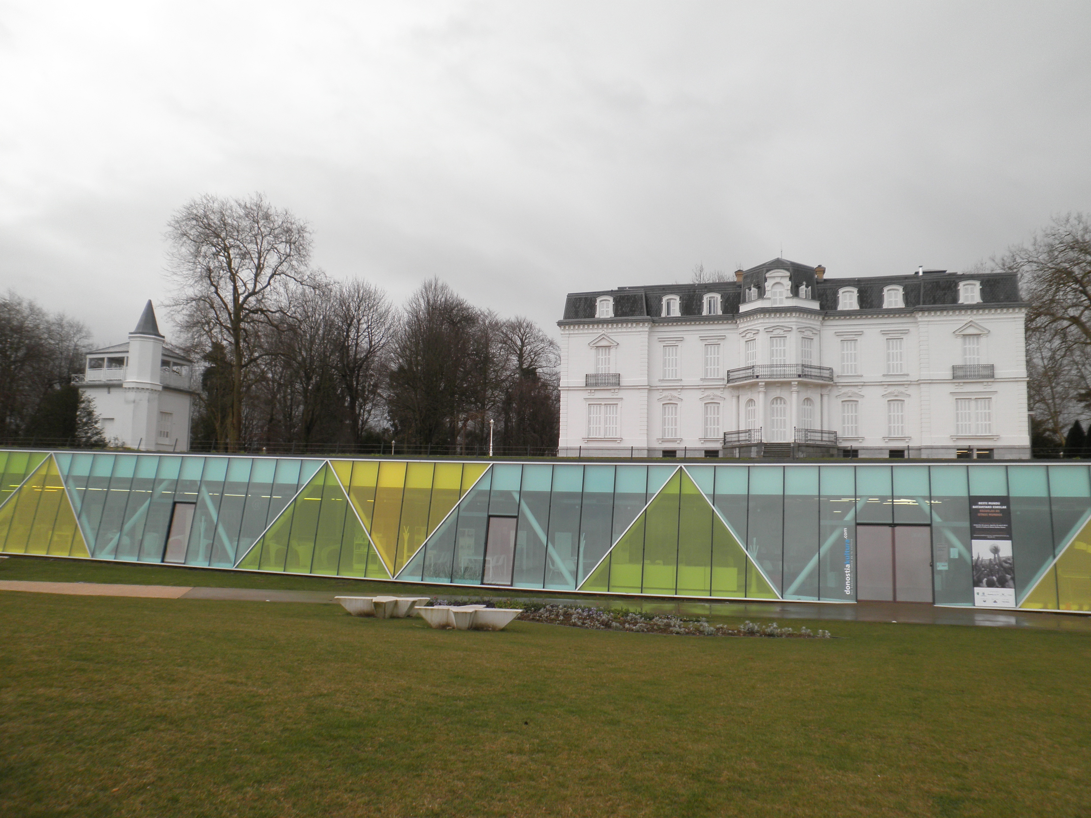 Aieteko jauregia eta kultur etxea